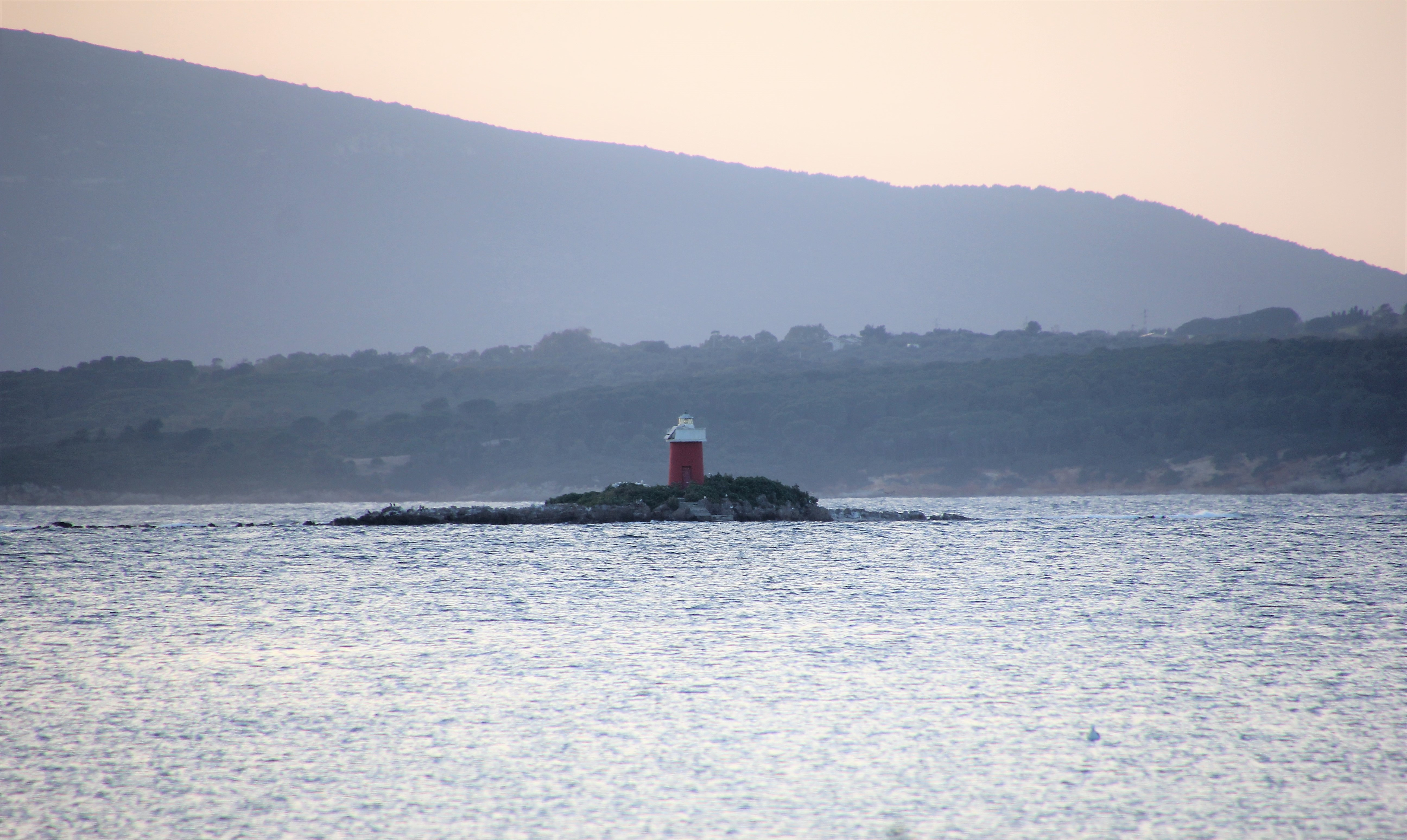 Alghero, isolotto della Maddalena